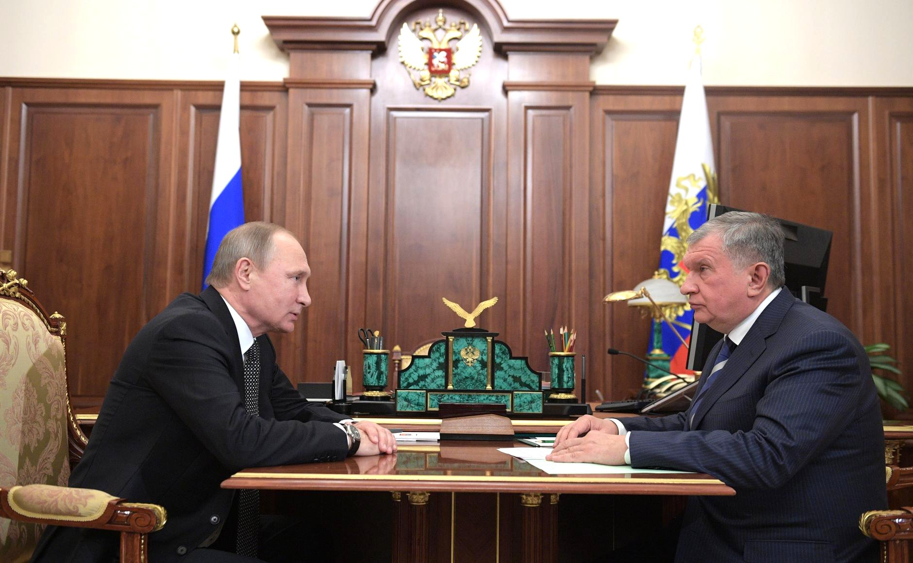 Встреча Президента России Владимира Путина с главой компании «Роснефть» Игорем Сечиным. Обсуждались итоги сделки по приватизации части акций российской нефтяной компании «Роснефть».